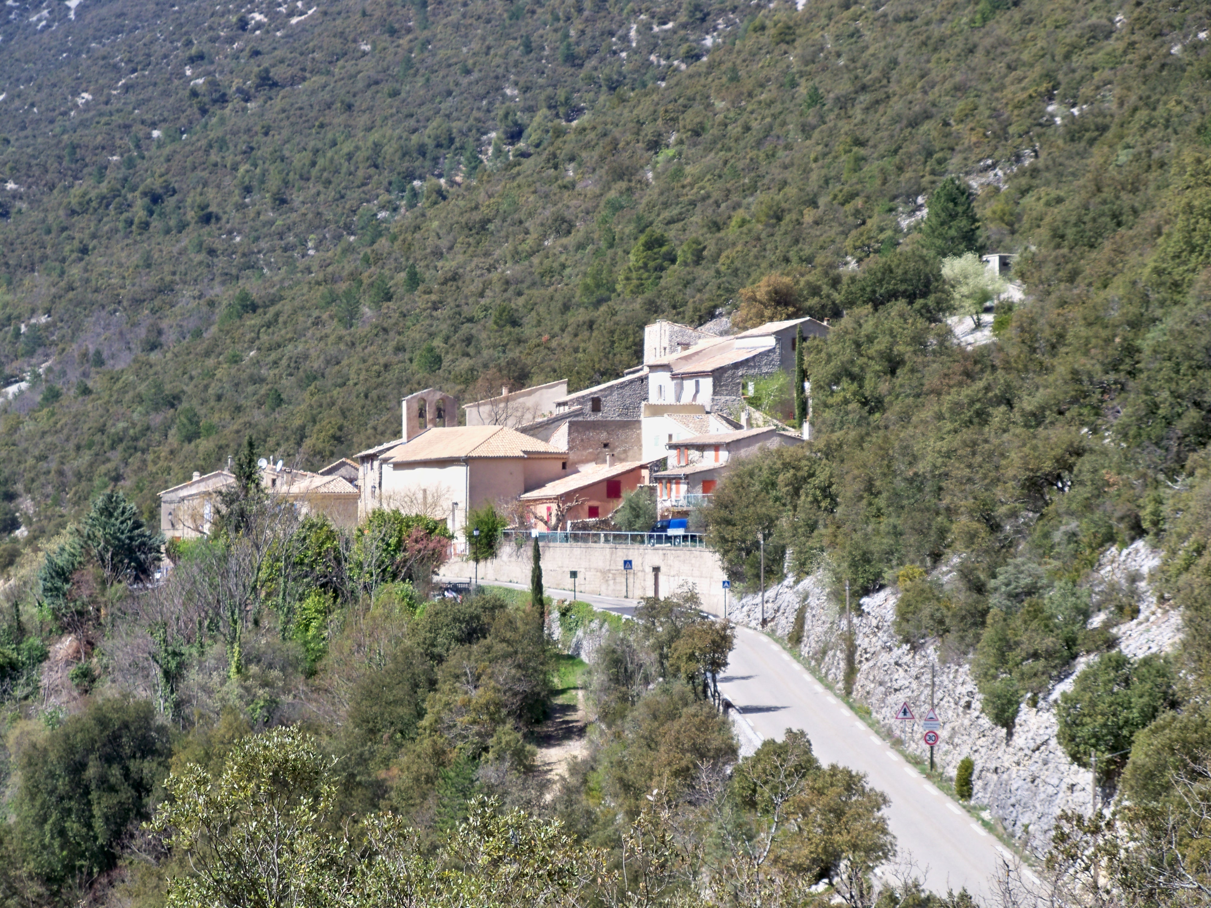 vue sur le village de Saint-Léger-du-Ventoux (84)